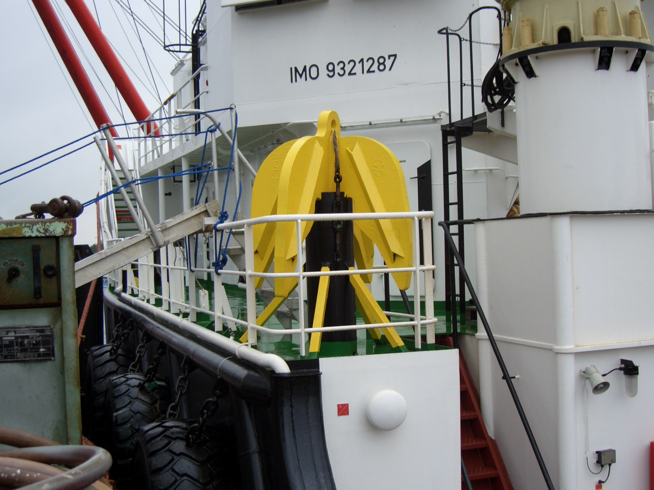 Draggen